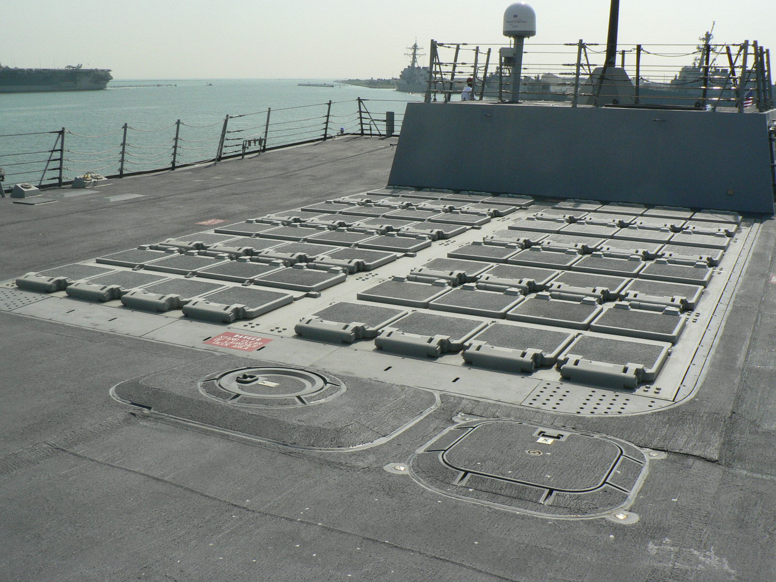 VLS Farragut